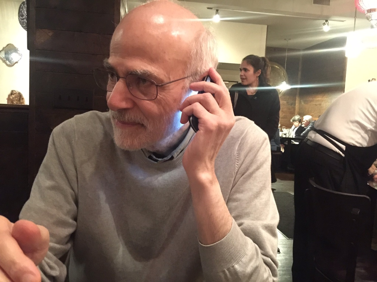 عساف في 11 أبريل 2019